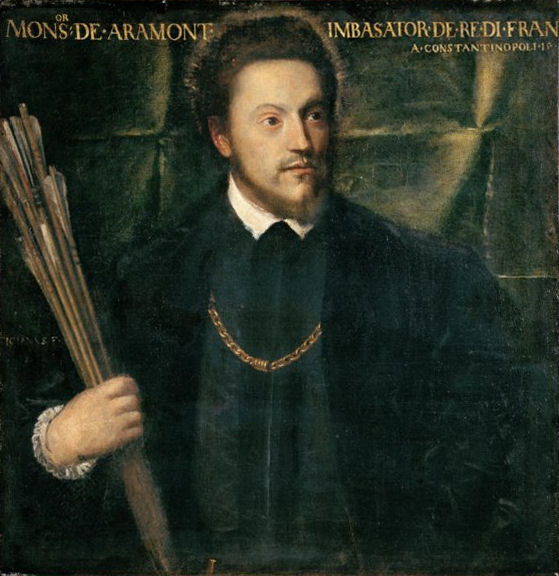 ambasciatore